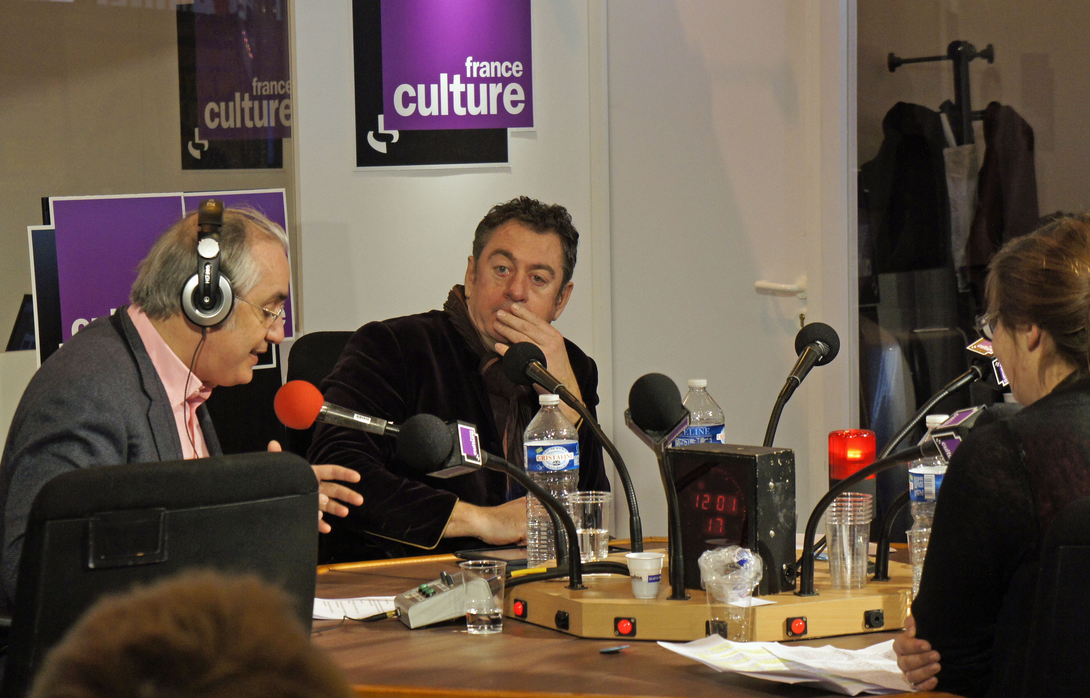 Emission On ne parle pas la bouche pleine de Alain Kruger avec au salon du livre 2012.